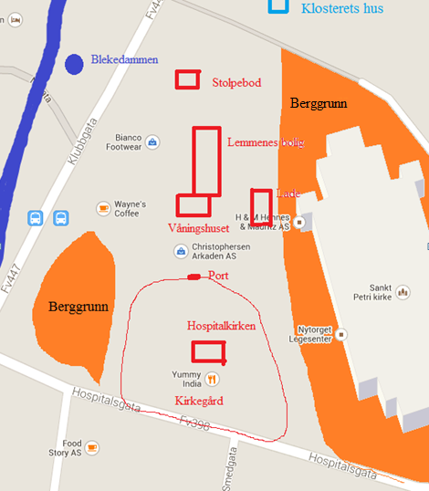 Kart over hospitalet og hospitalkirken omlag 1807